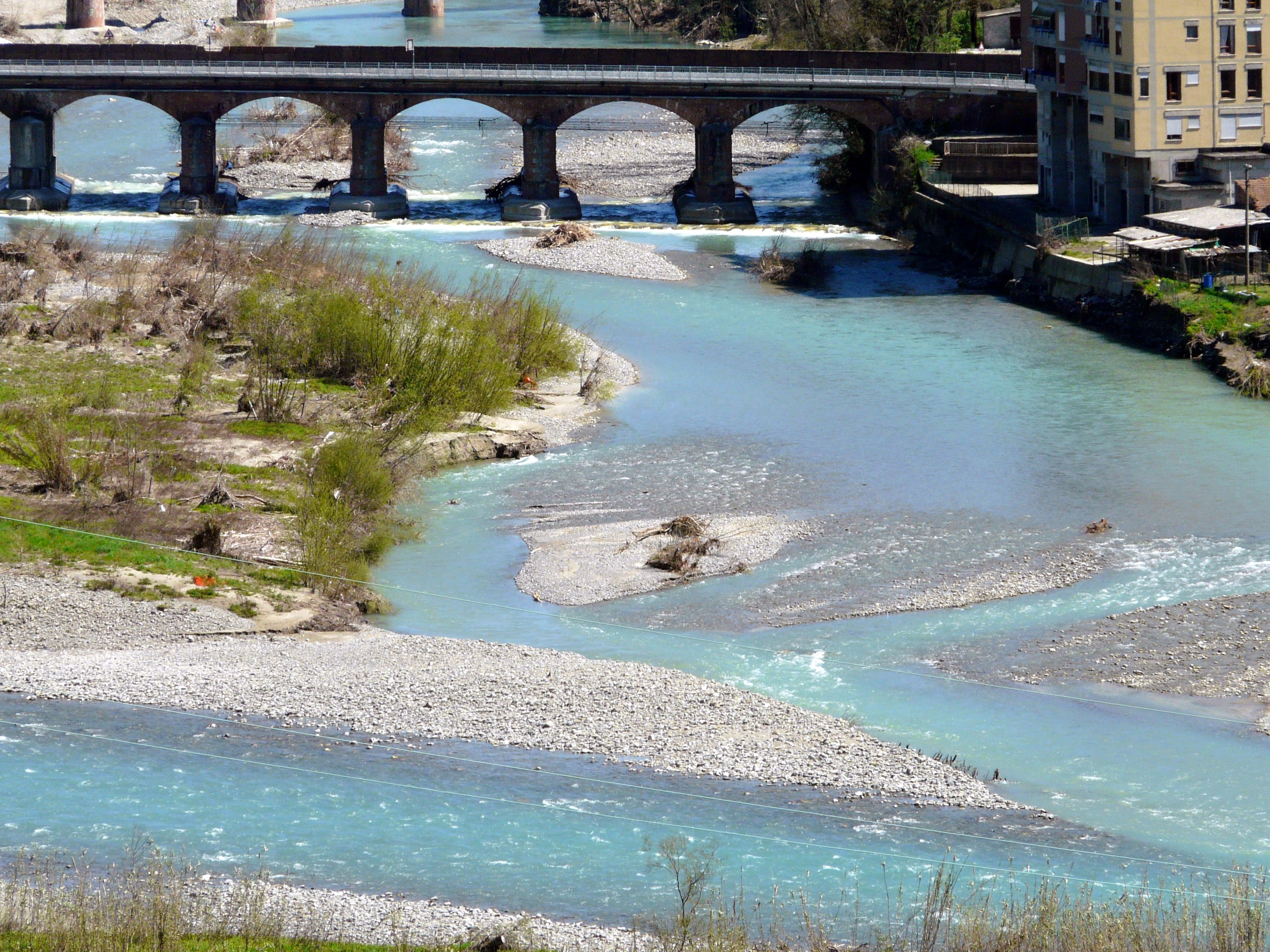 Confluenza del torrente Aulella nel fiume Magra, Aulla, Toscana, Italia